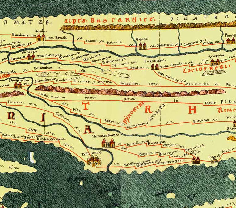 Ausschnitt aus der Tabula Peutingeriana mit Castris rubris (Mitte - etwas unterhalb)